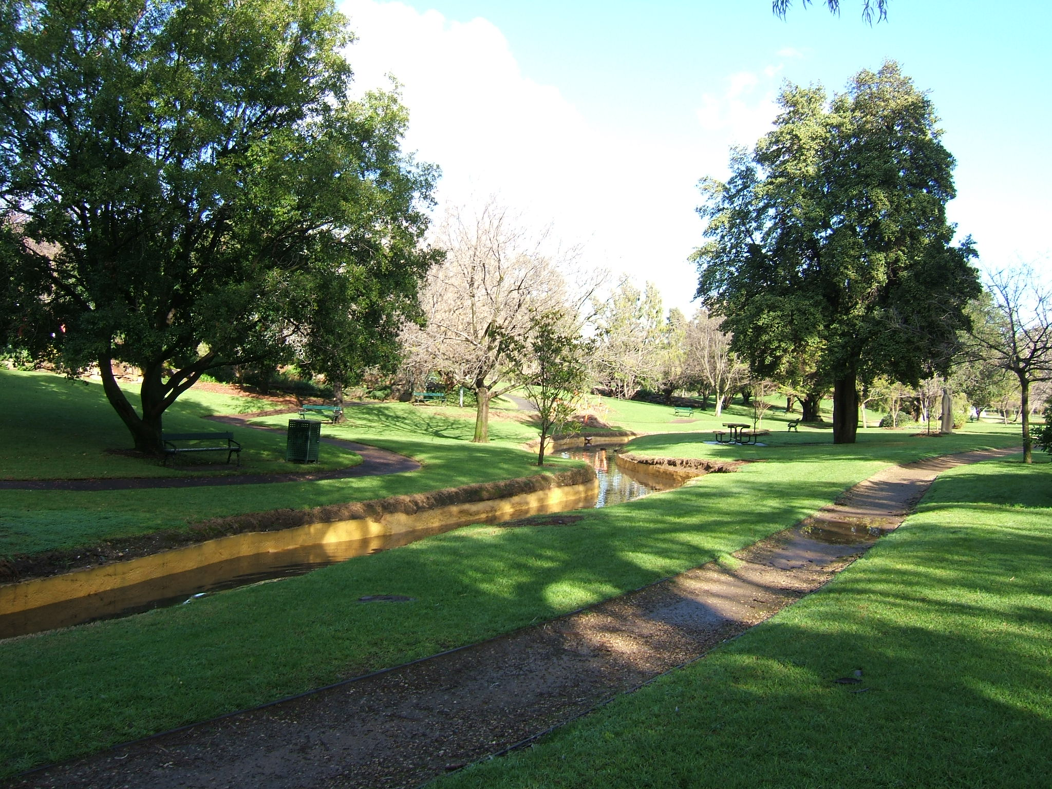 Veale Gardens, Adelaide